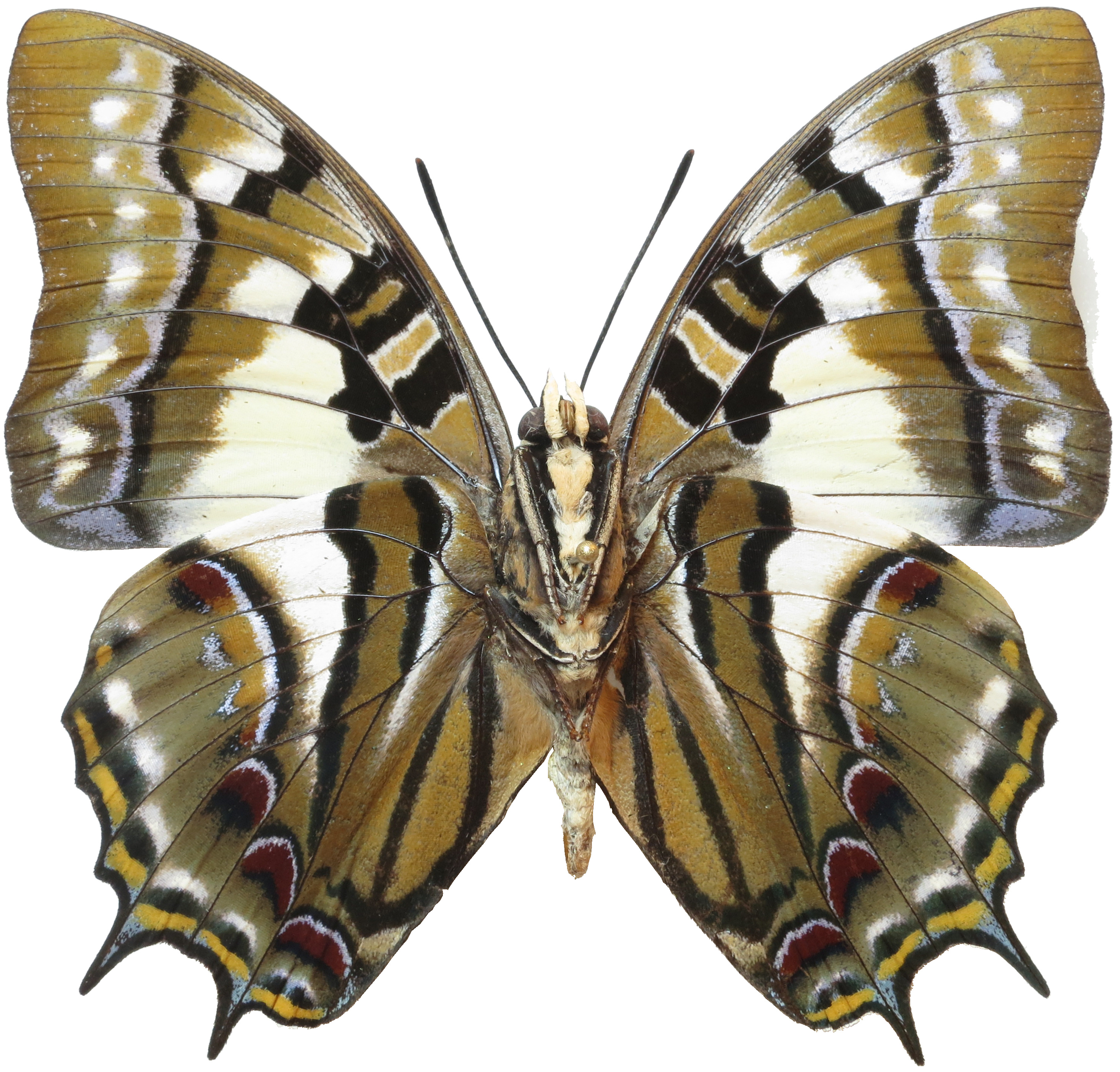 Polyura pyrrhus Pyrrhus from Ceram Island, Indonesia